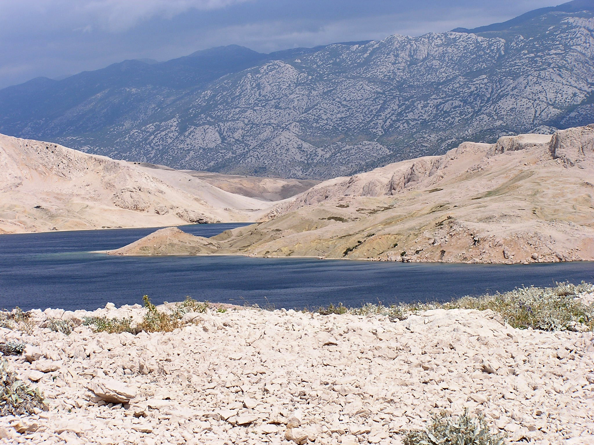 Island Pag